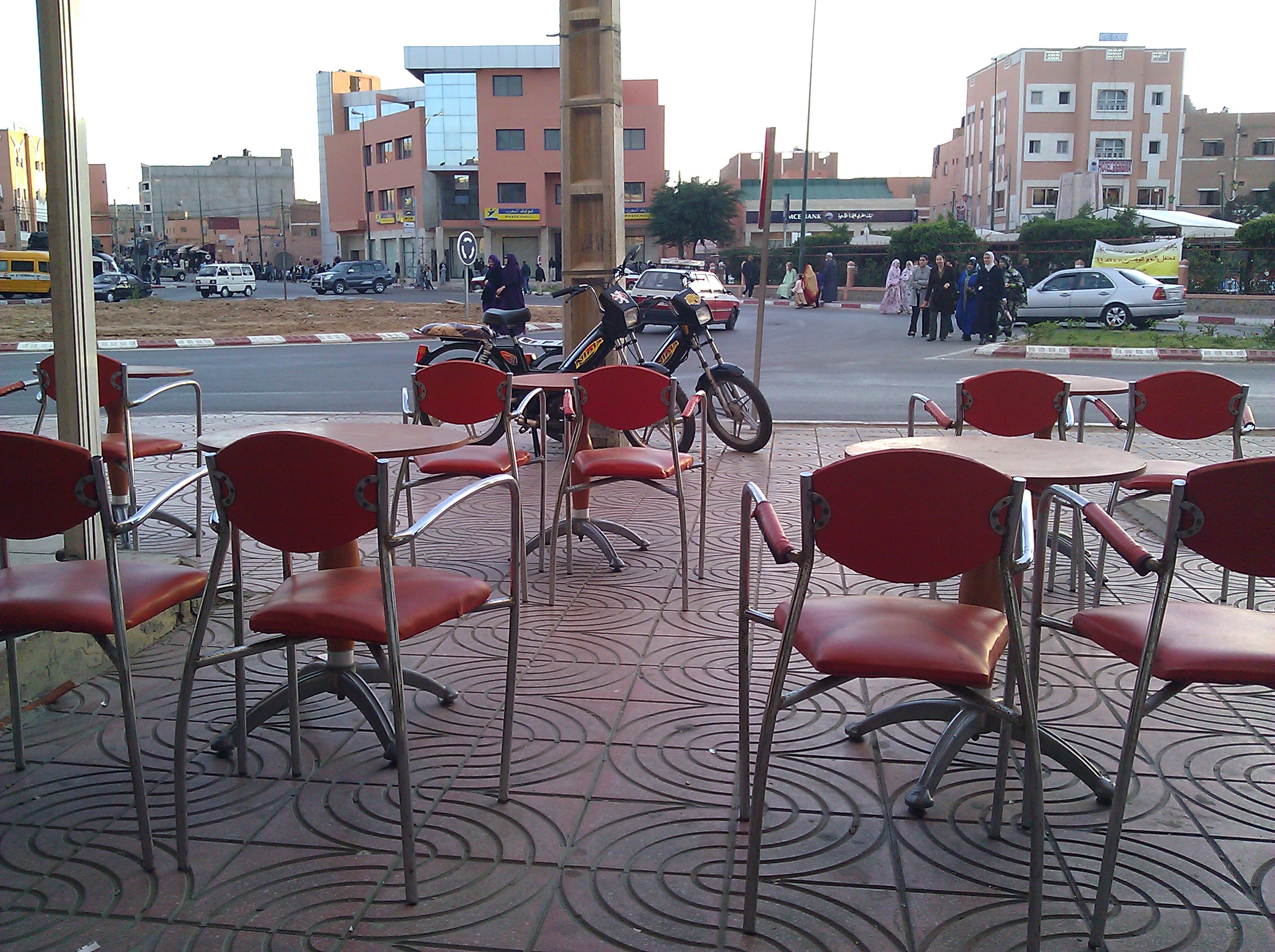 Laayoune, Morocco